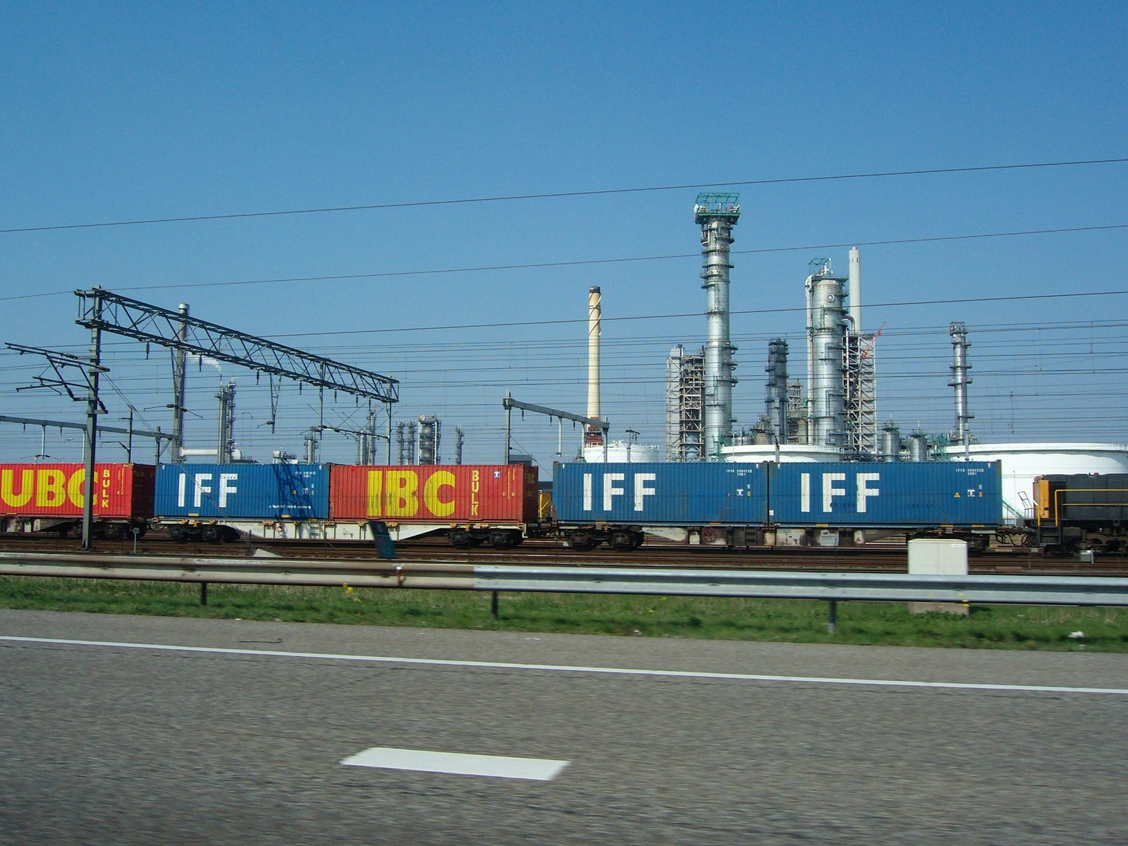 Botlek port area seen from Rijksweg A15